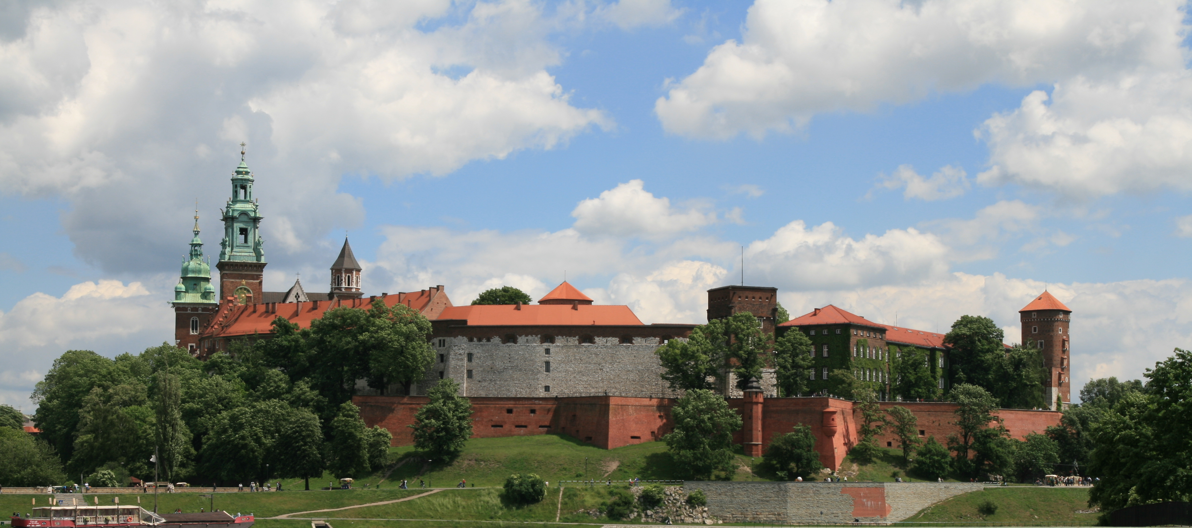 Wawel, widok z mostu Dębnickiego